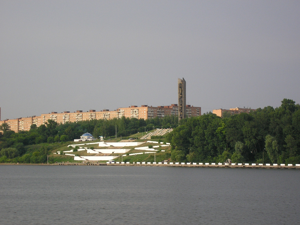 Памятник дружбы в Ижевске